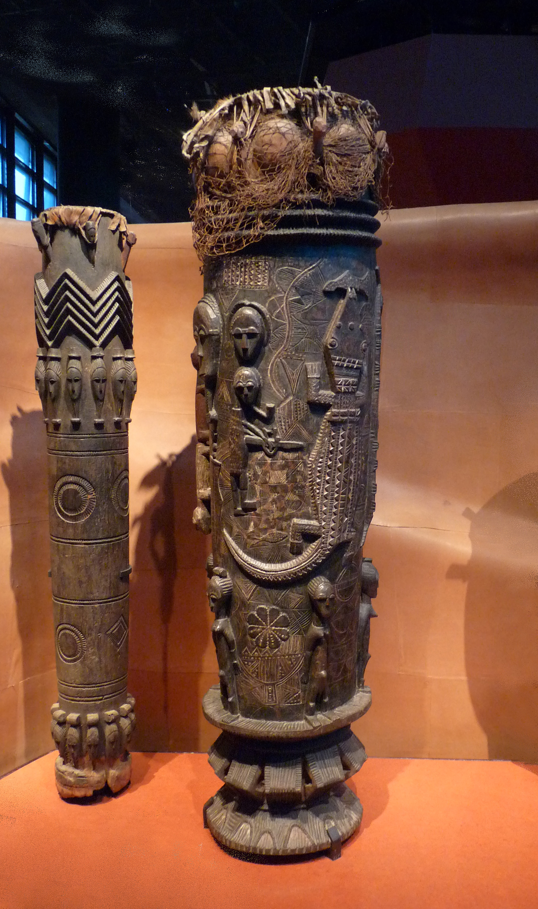 Tambour, population Baoulé, Côte d'Ivoire, Fin du 19e siècle. Bois, pigments, fibres végétales. Musée du quai Branly.